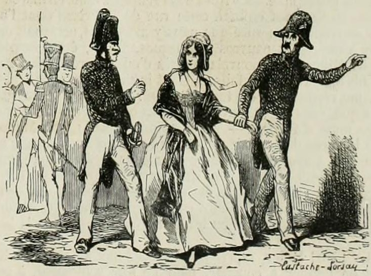 Arrestation d’Élise Sergent à la sortie du bal Mabille le dimanche 25 mai 1845